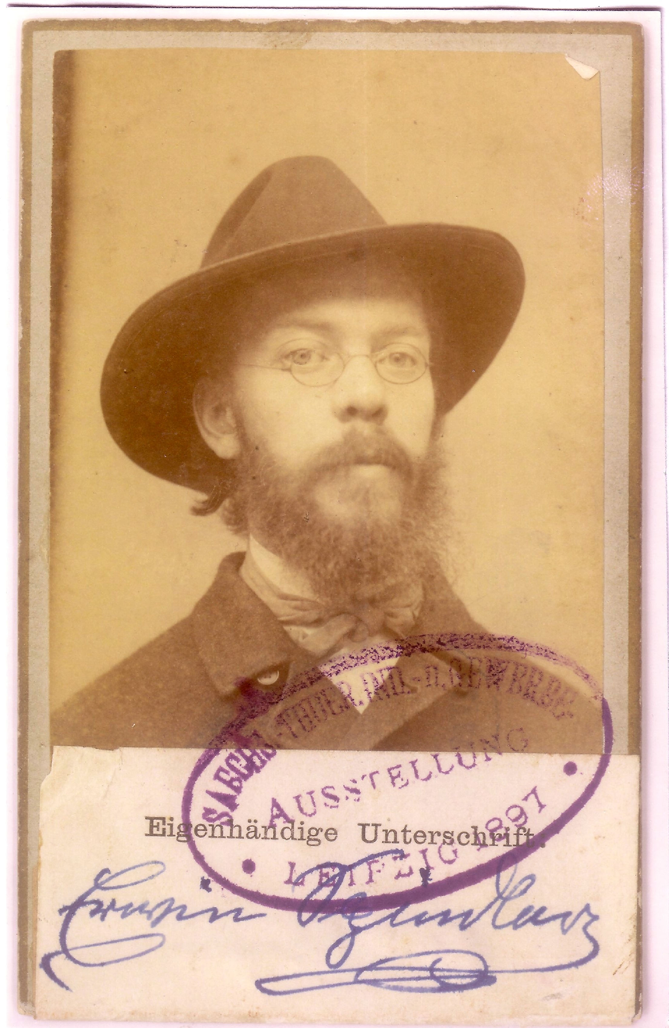 Erwin Spindler im Alter von 37 Jahren. Eintrittskarte zur Sächs.-Thüringischen Industrie- u. Gewerbeausstellung 1897